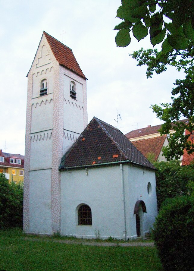 Alte St. Georgs-Kirche in München Milbertshofen, heute Kapelle